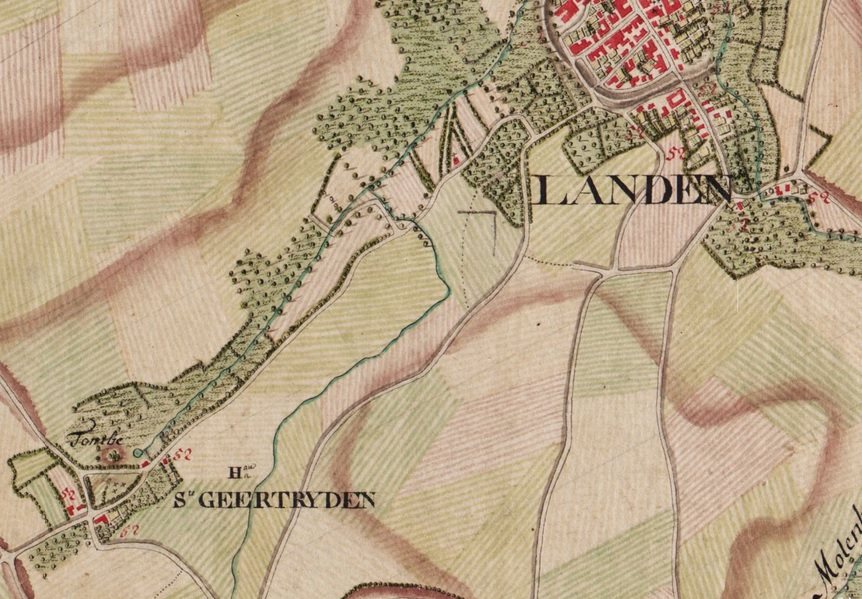 Extrait de la carte de Ferraris n° 133B